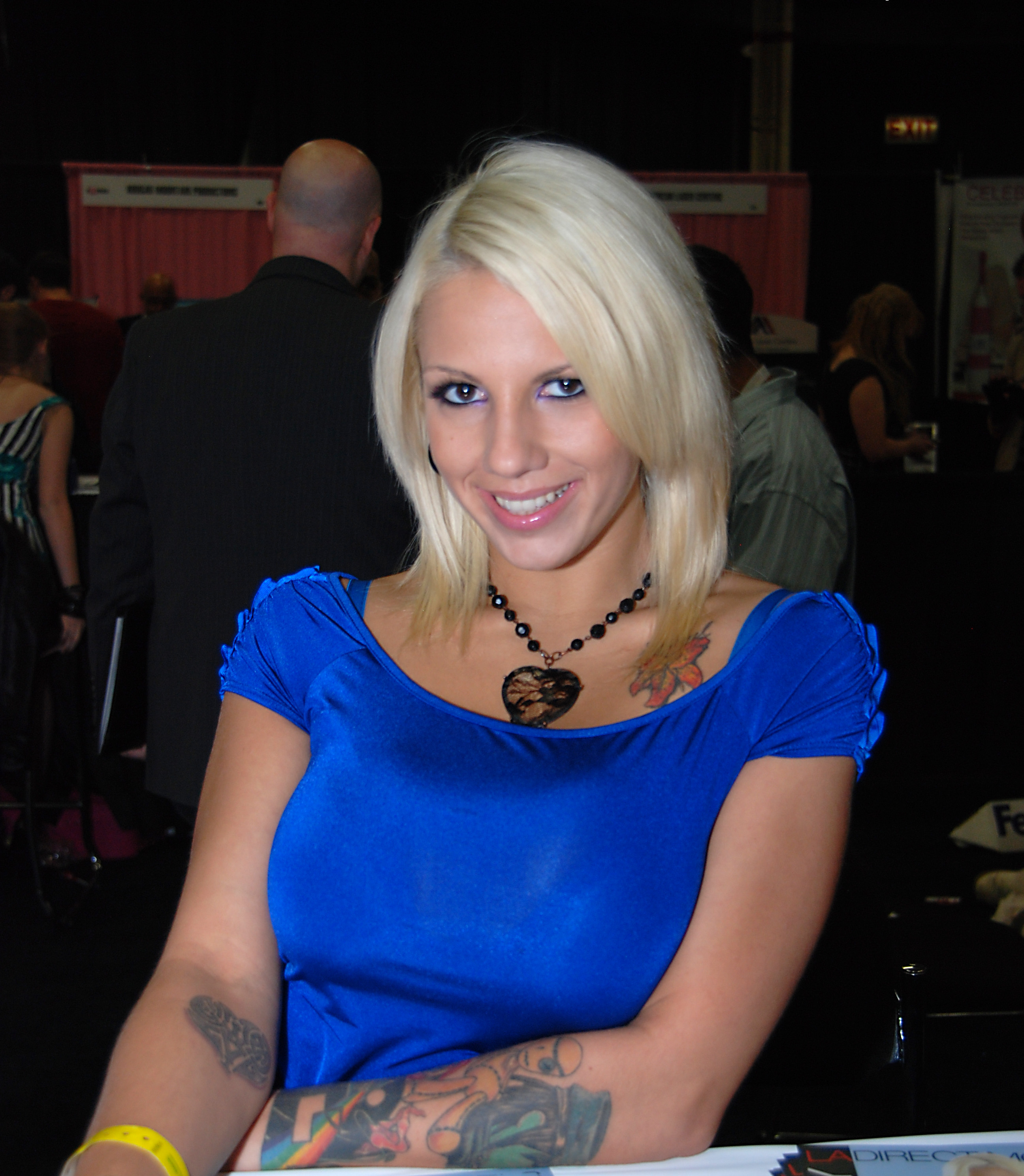 DSC_0225A